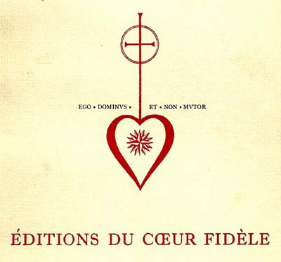 Logo della casa editrice Éditions du Coeur Fidèle (fondata e diretta a Roma da Pierre Pascal)